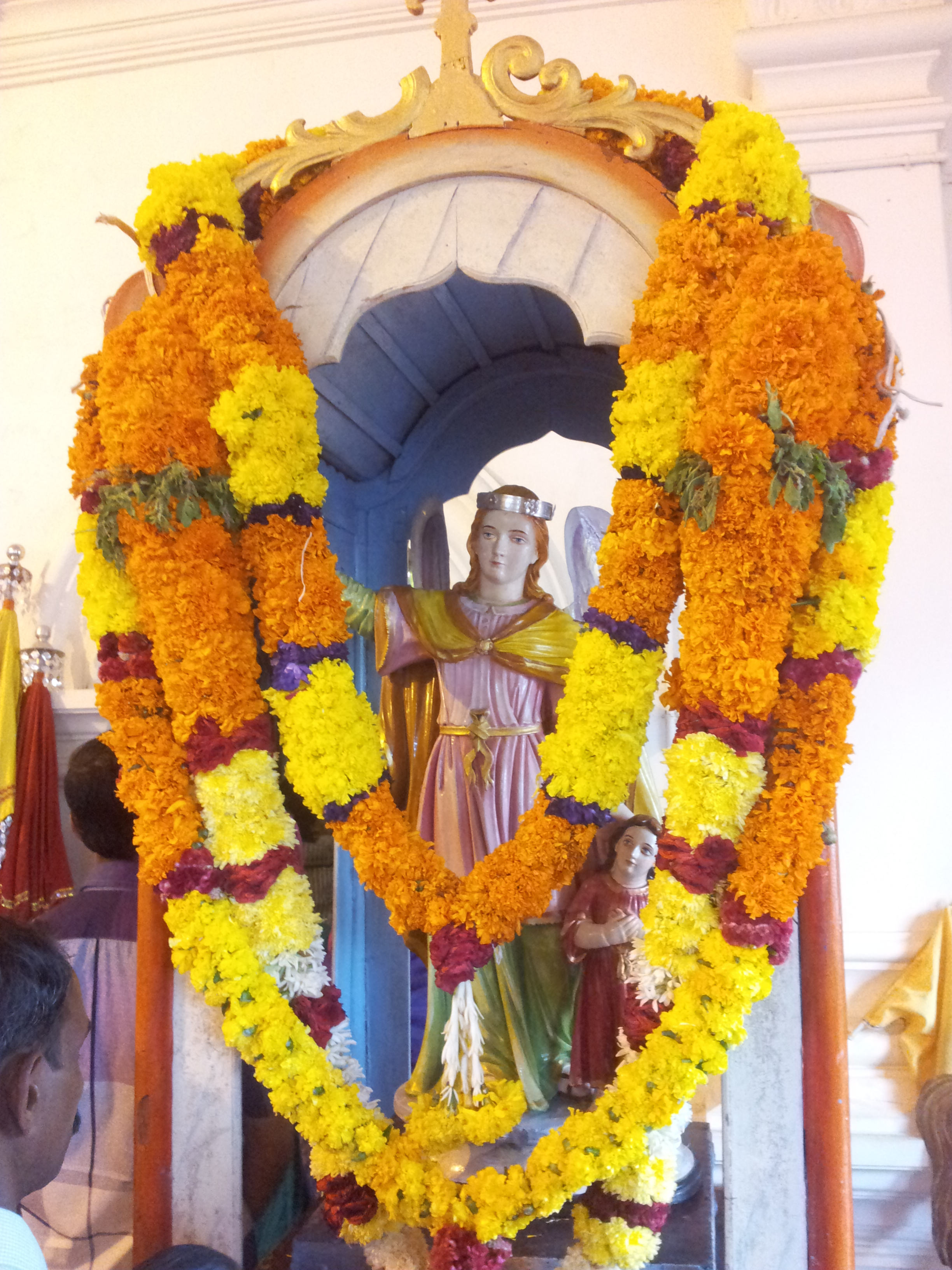 രൂപക്കൂട് 3, വെച്ചൂർ പള്ളി